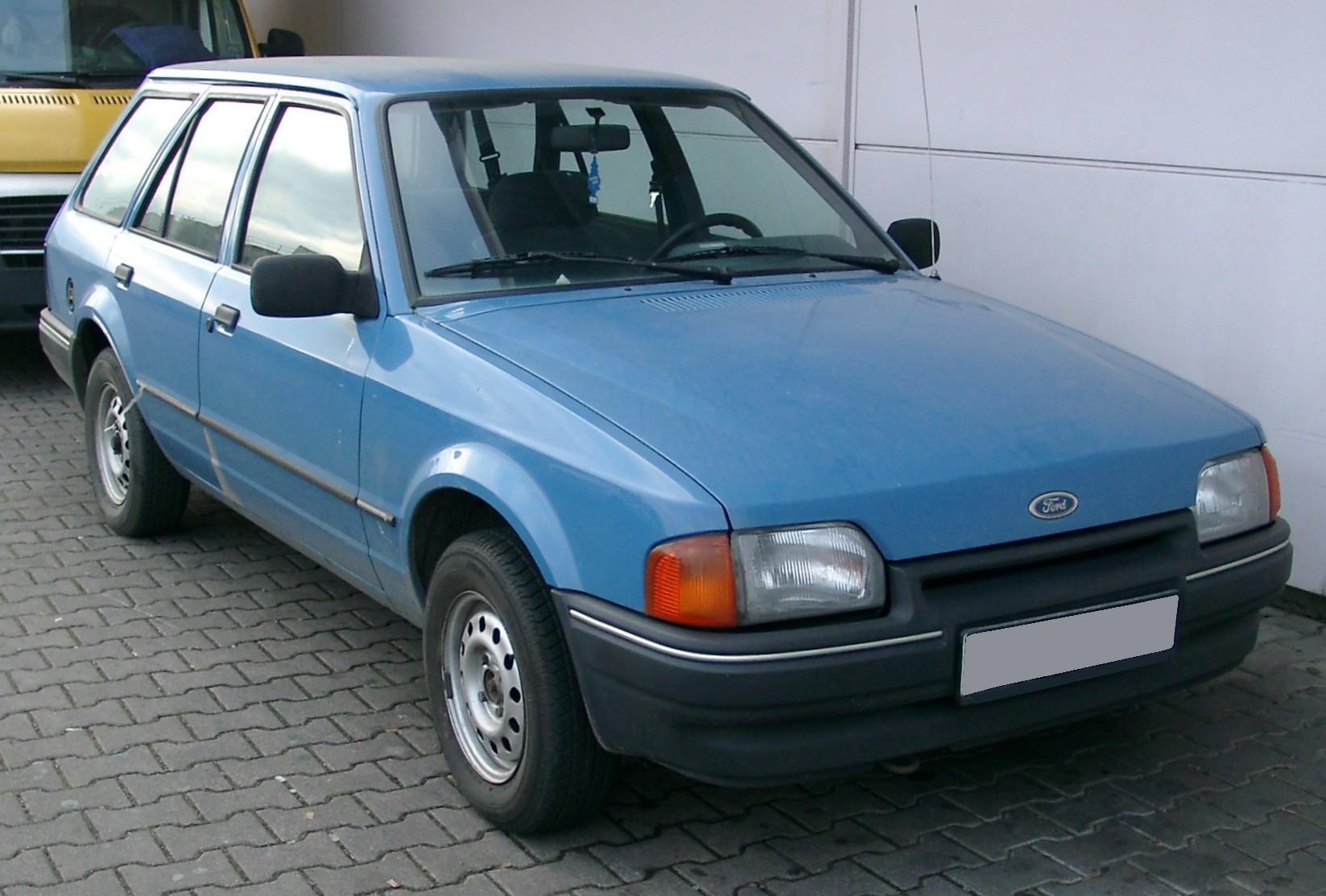 Ford Escort MK4 Kombi